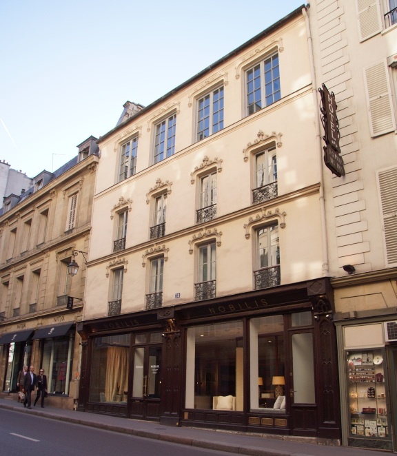 Immeuble 38 rue Bonaparte